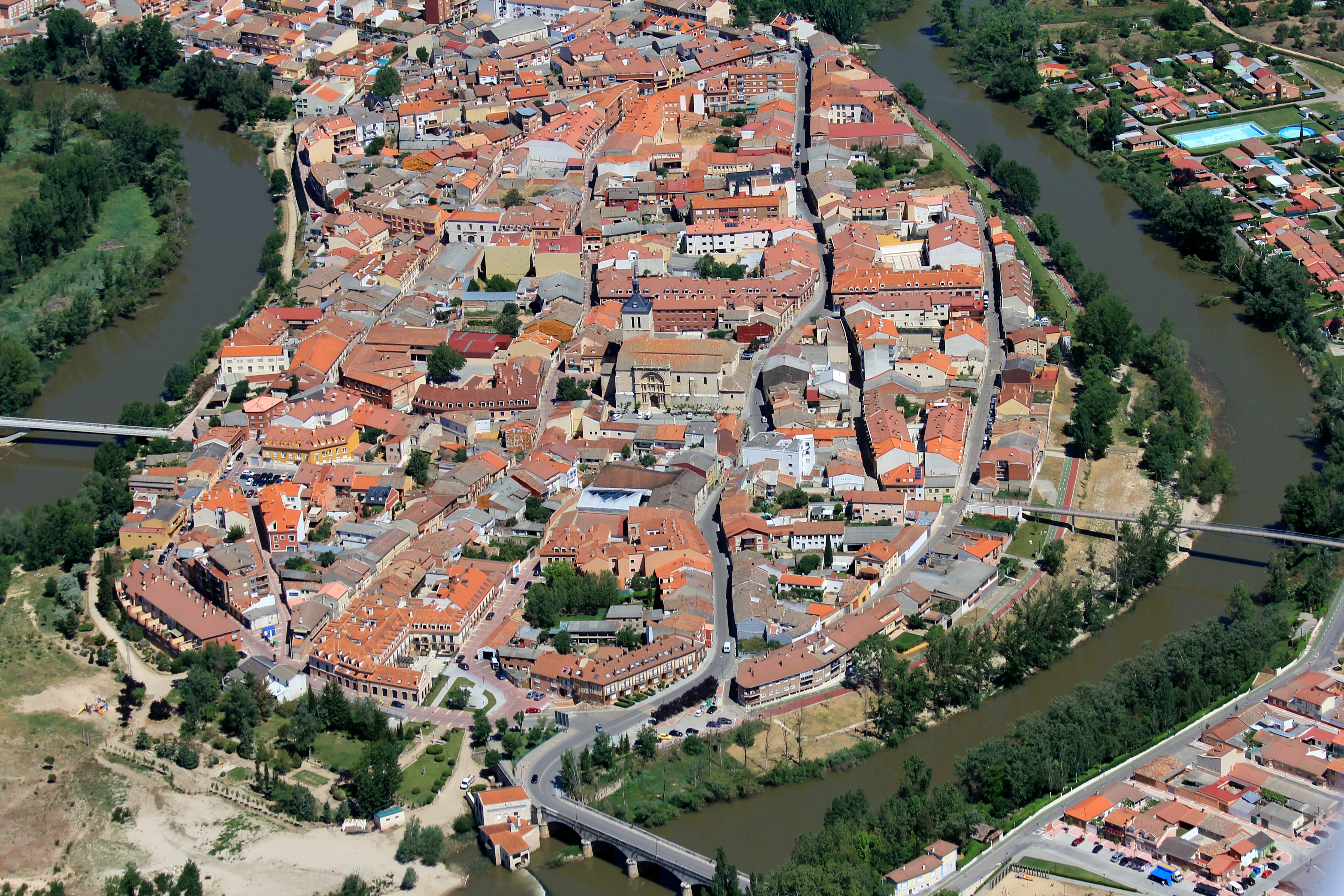 La villa tiene más de 2.00 años de antigüedad y se encuentra asentada en un meandro natural del río Duero